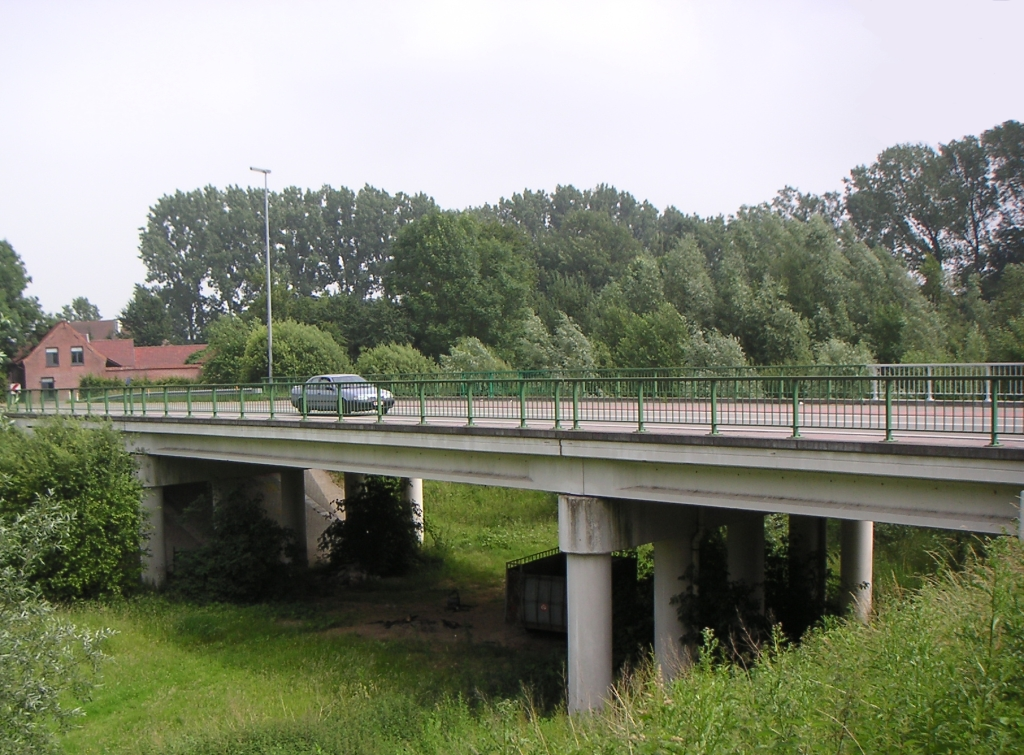 Pont à Herzele (Belgique)